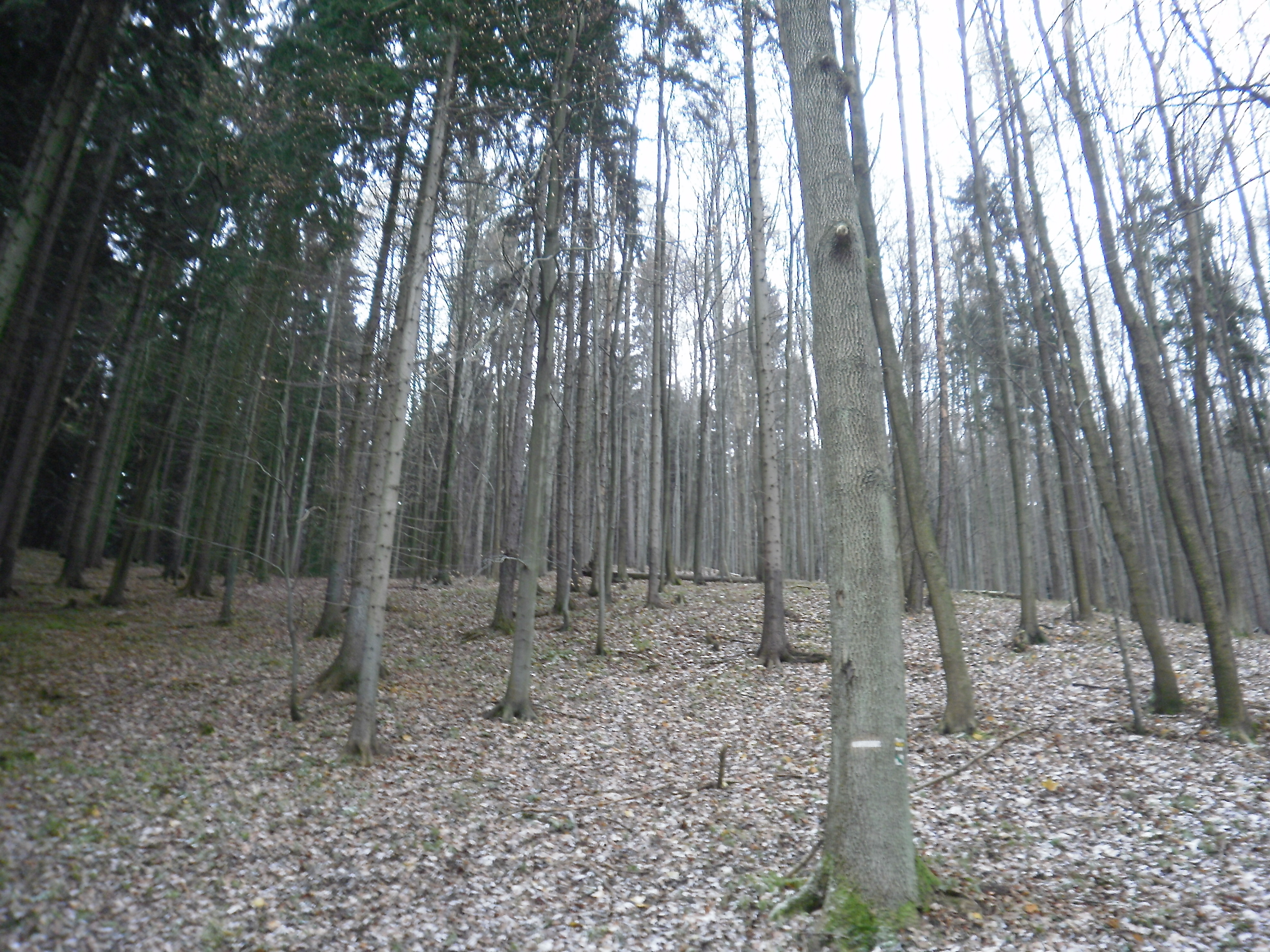 NPR Karlovské bučiny - pohled zdola